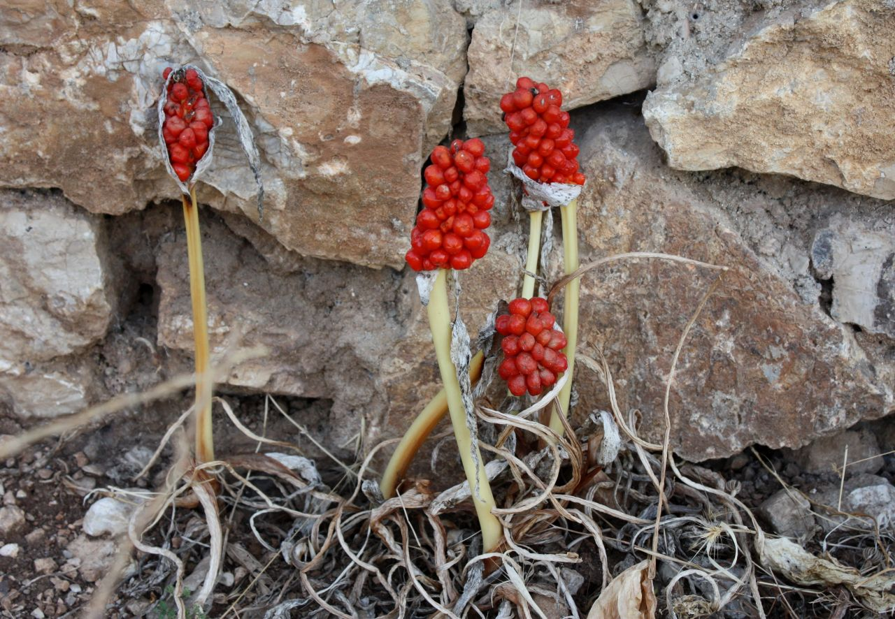 Fruchtstand des Aronstabs, aufgenommen in Butint (Albanien)